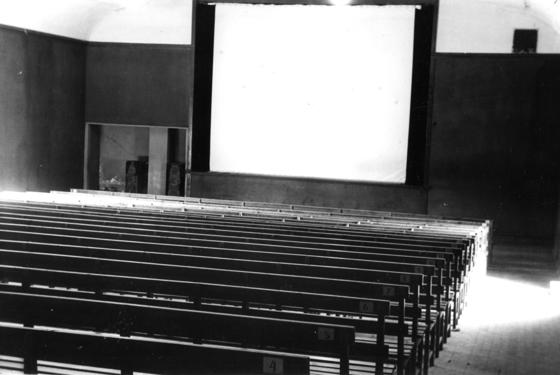 Fram Kino